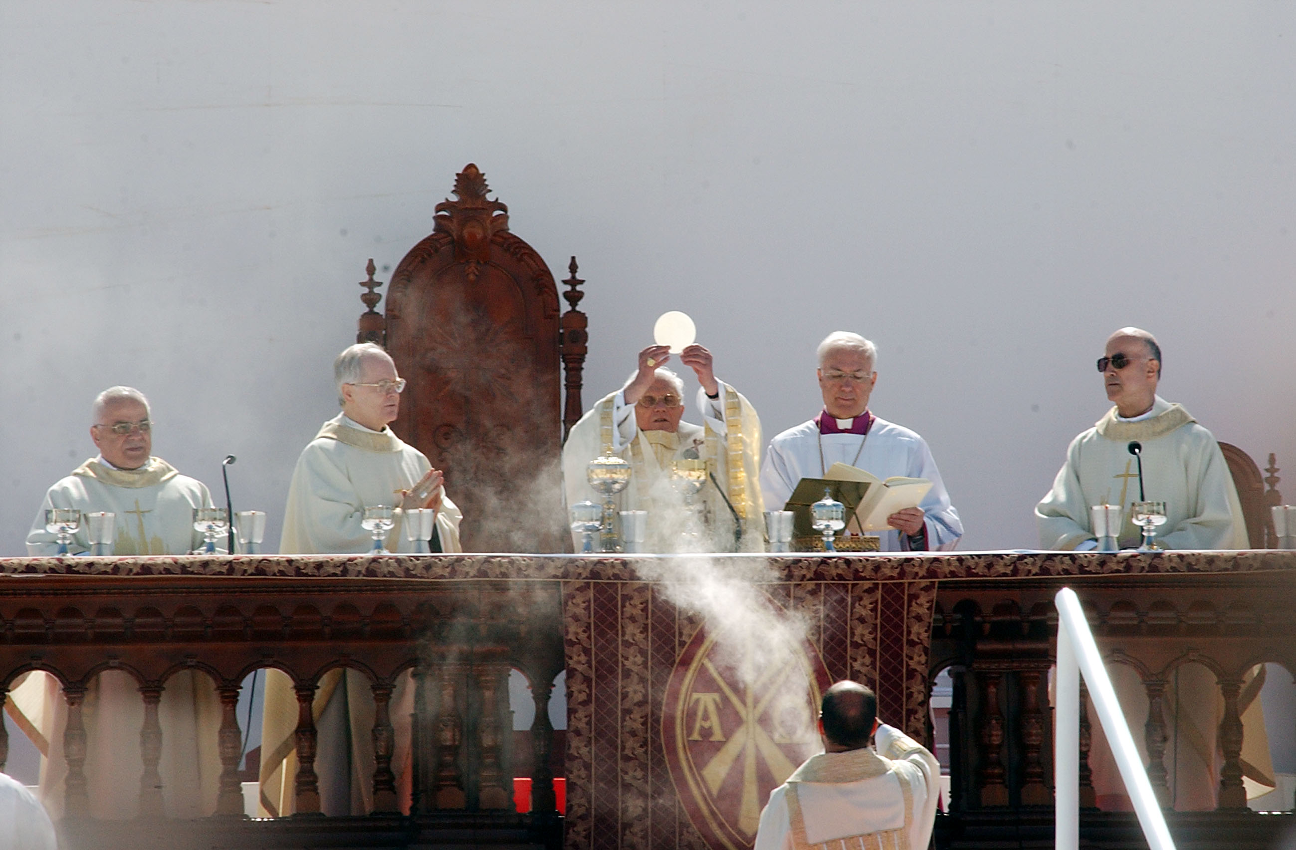 Cerimônia de canonização do frade brasileiro Frei Galvão celebrada pelo papa Bento XVI no Campo de Marte em São Paulo, Brasil.